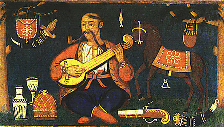 Козак Мамай. Народна картина Олія. 18 ст.